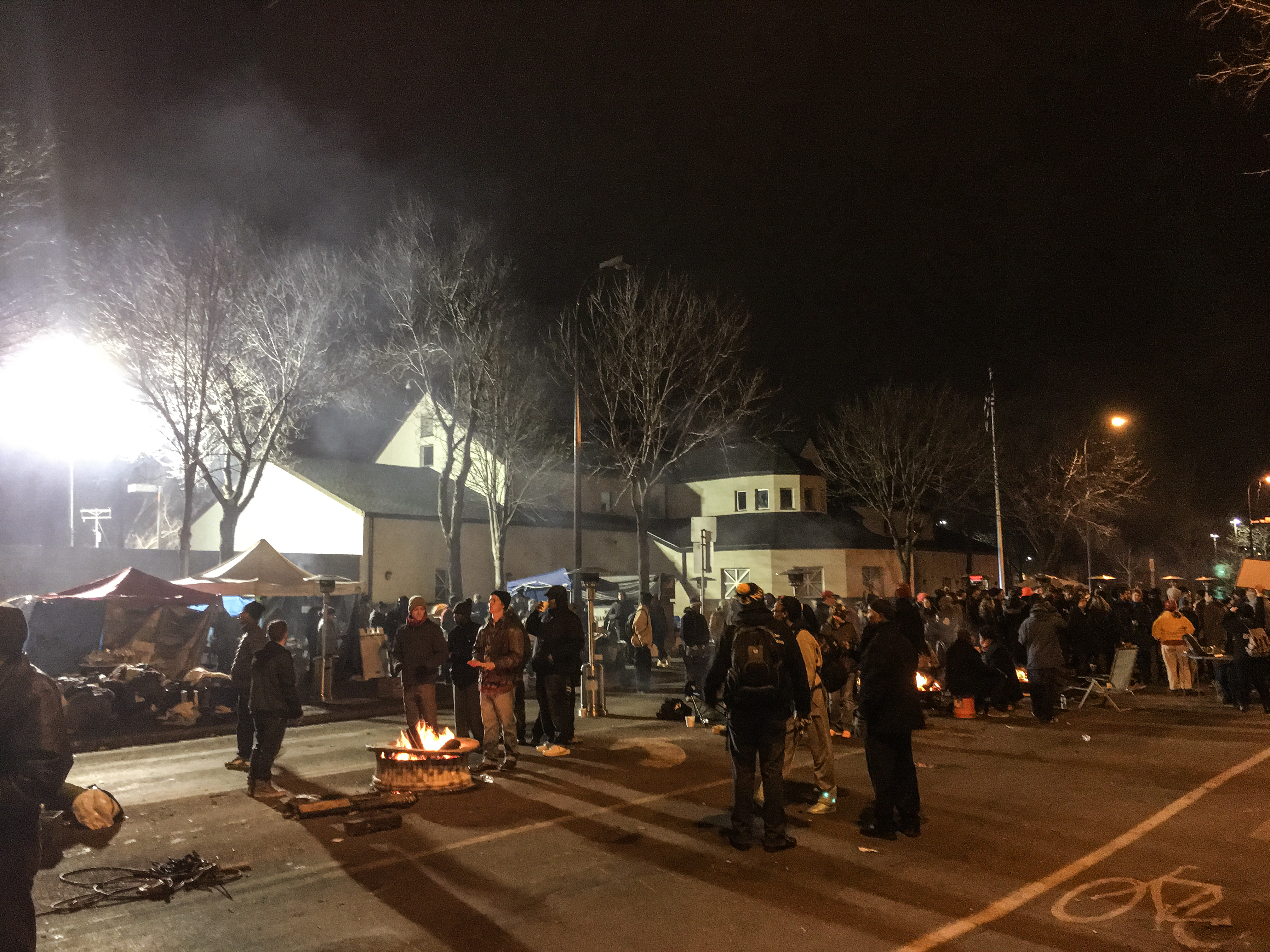 Minneapolis, Minnesota